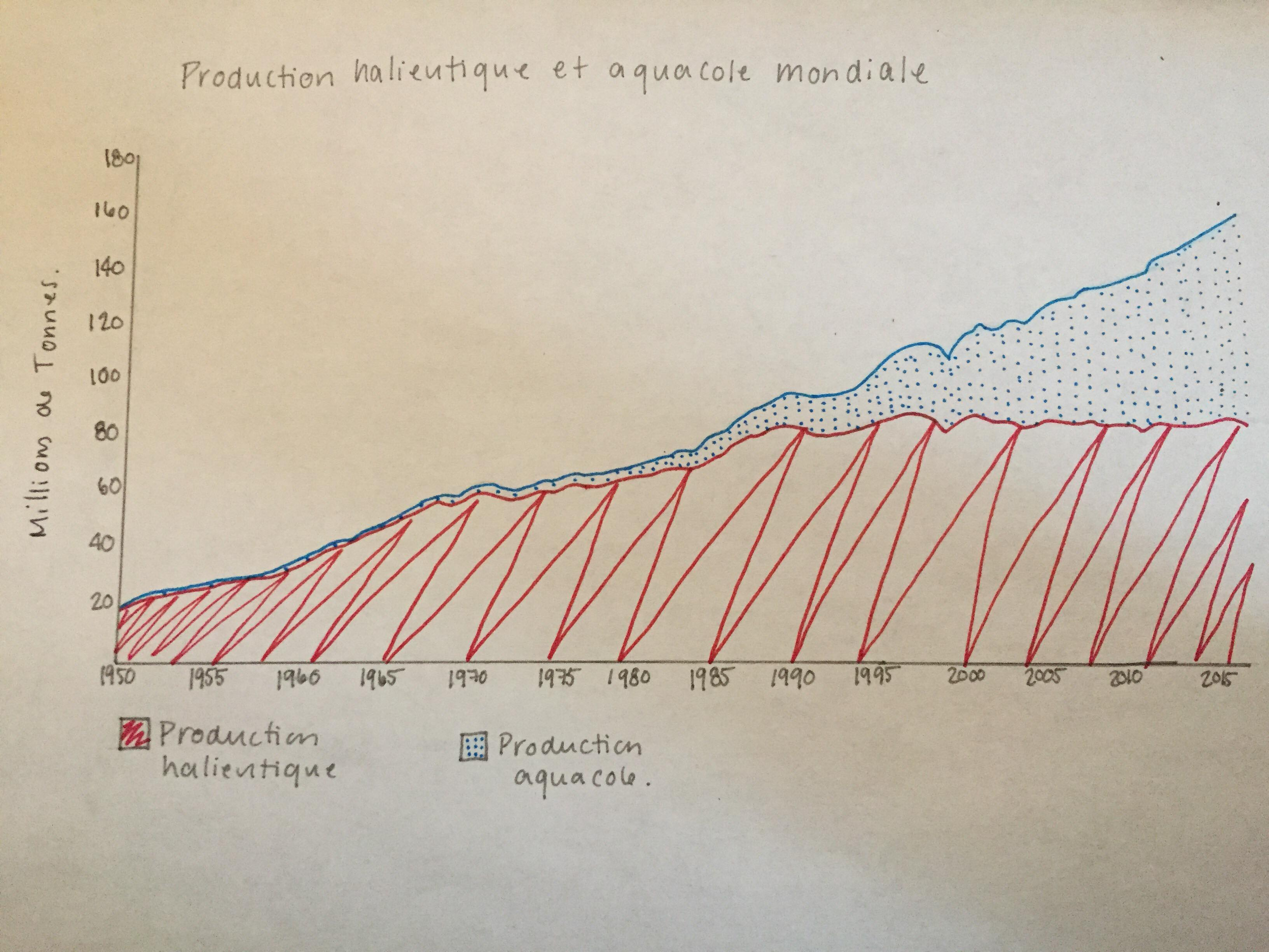 Graphique de la production halieutique en comparaison avec la production aquacole mondiale de 1950 à 2016.